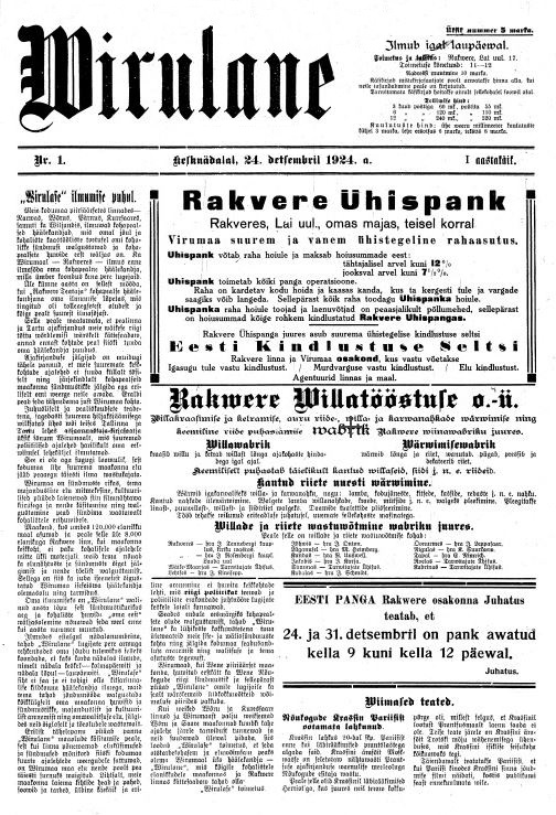 Ajalehe Wirulane 1924 esimene number